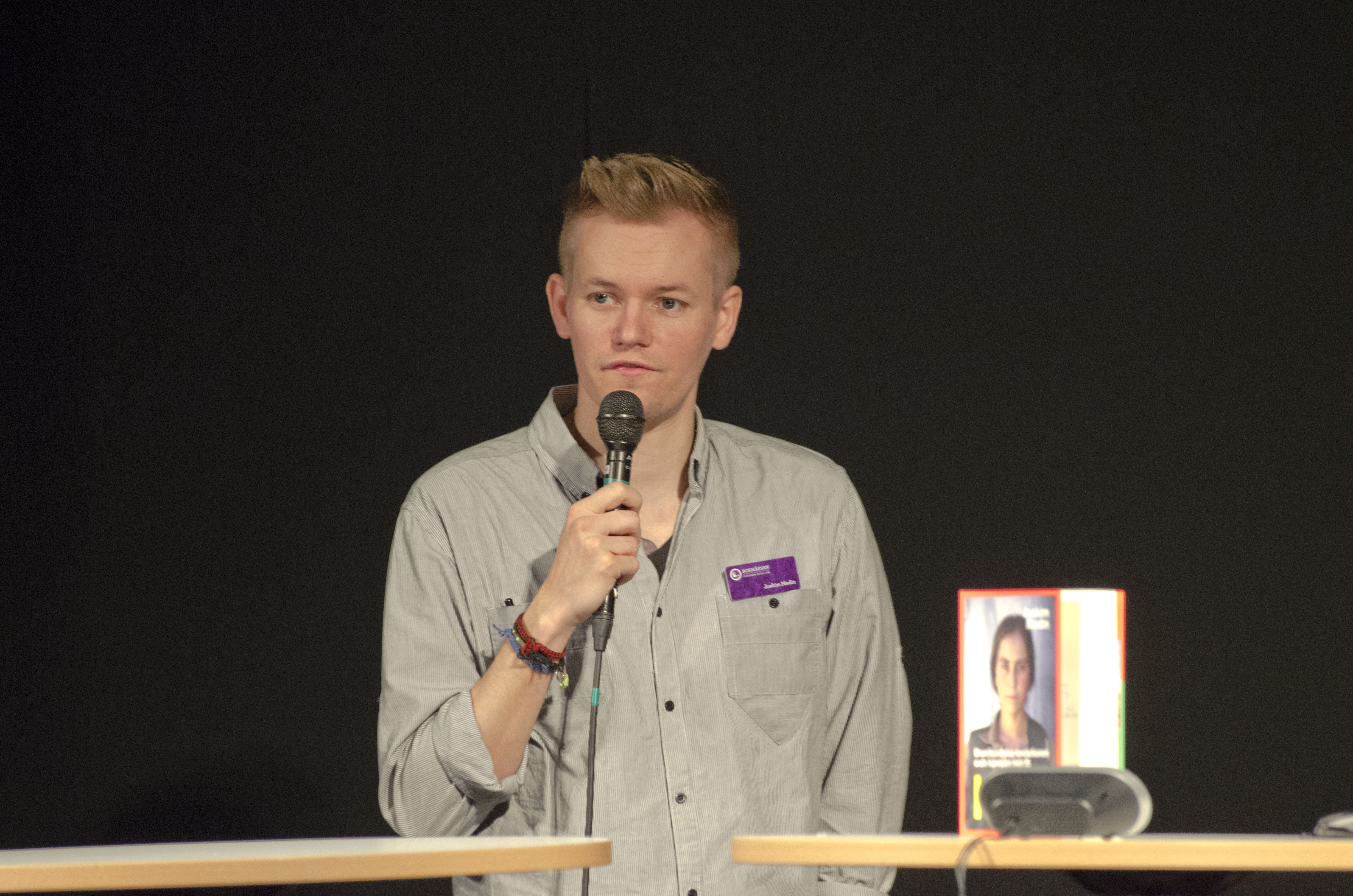 Joakim Medin Göteborgs Bokmässa 2016.